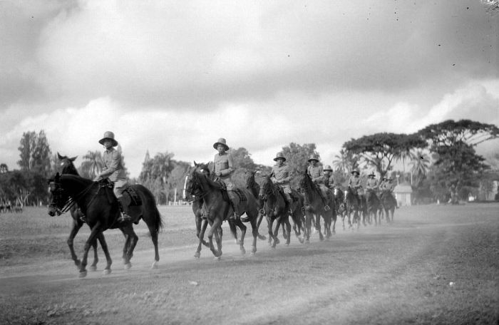 Negatief. De cavalerie te Malang, Oost-Java